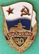 Нагрудный значок "Видяево" (Мурманская область)